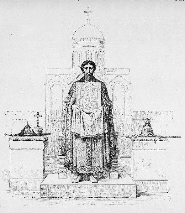 Великий Князь Андрей Юрьевич Боголюбский. 1169-1174 г. Великий Князь Андрей Юрьевич основал Боголюбов и перенес чудотворный, по преданию писанный Евангелистом Лукою, Византийский Образ Богоматери из Вышгорода во Владимир новую столицу Руси. Прозванный за ум "Вторым Соломоном", первый начал борьбу с пагубной удельной системой. Убит злоумышленниками и причтен к лику святых.